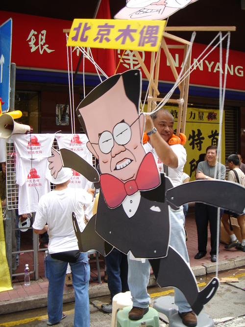 Licensing Zdroj: Foto Wikipedista:Pkahl